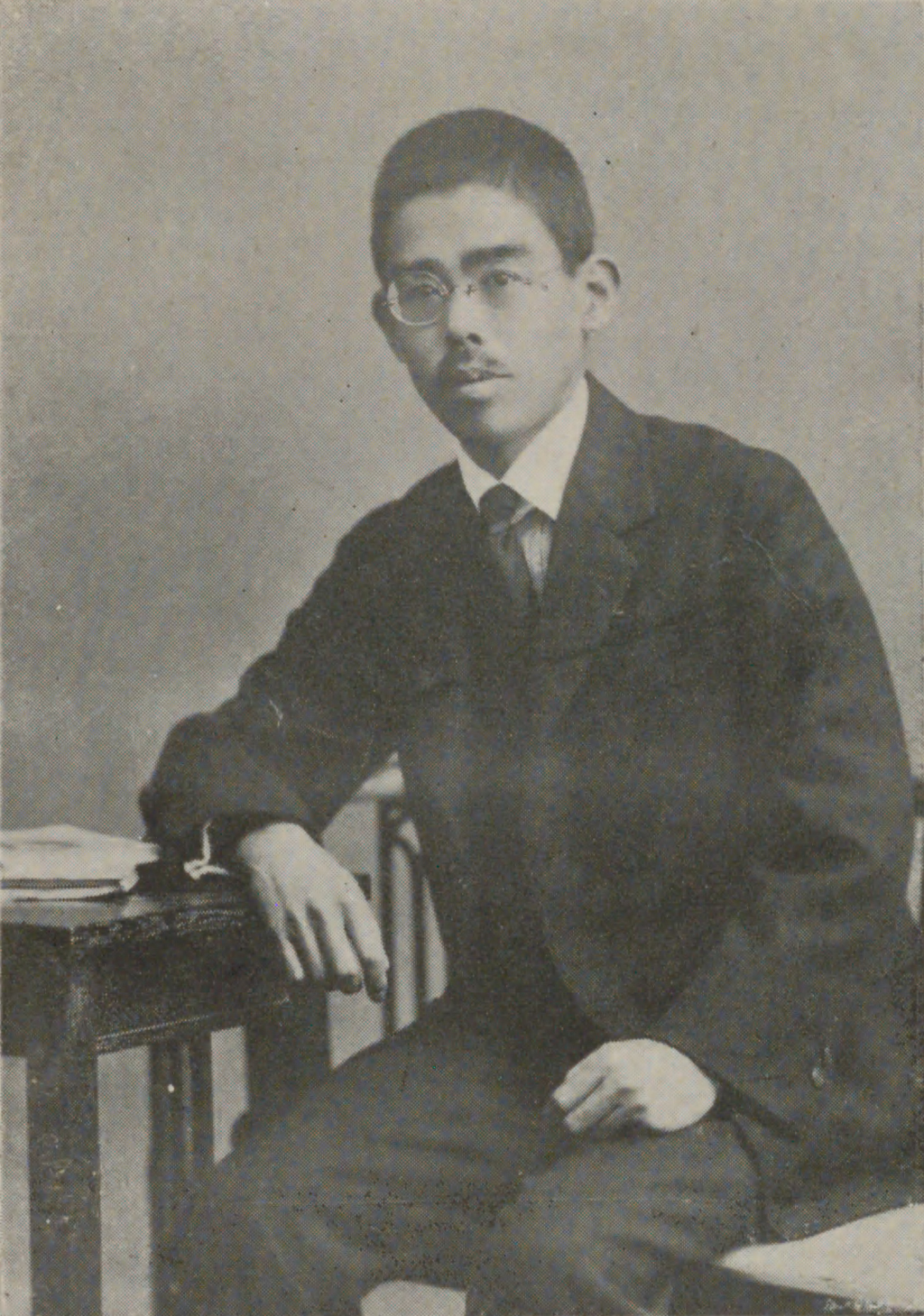 Portrait of Takabatake Motoyuki (高畠素之, 1886 – 1928)